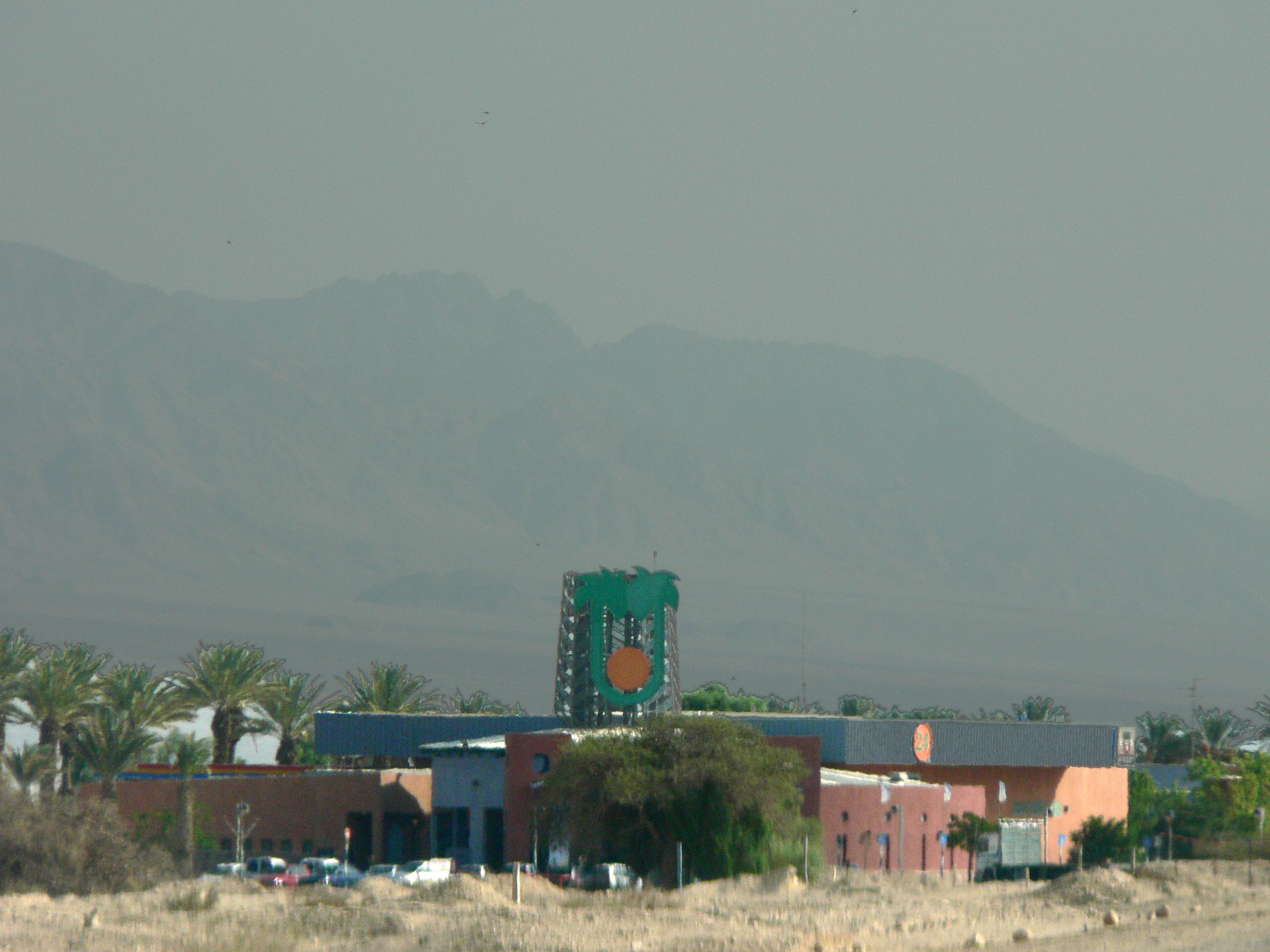 Yotvata road inn חניון יטבתה